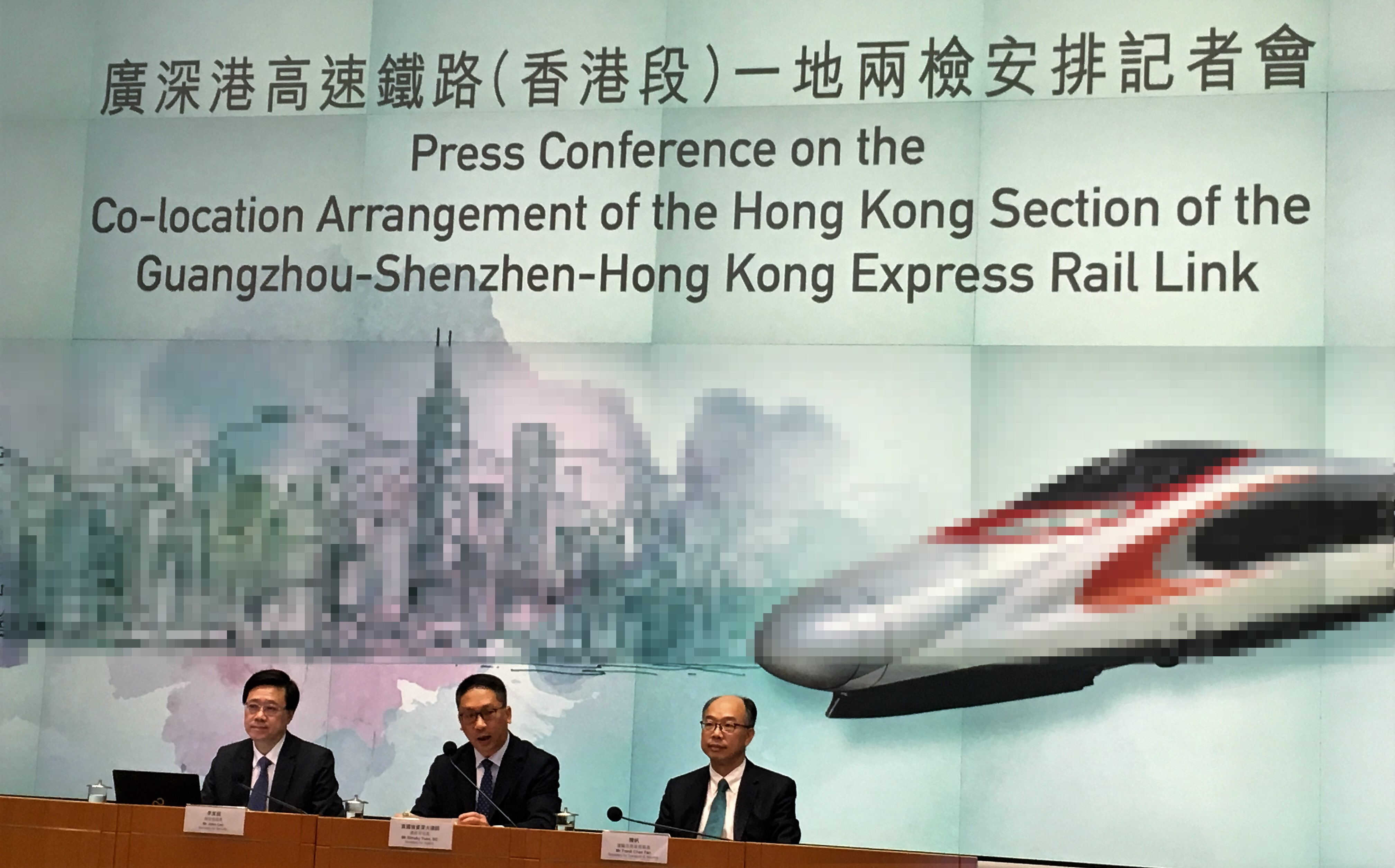 香港政府召開記者會公佈西九高鐵總站一地兩檢方案。